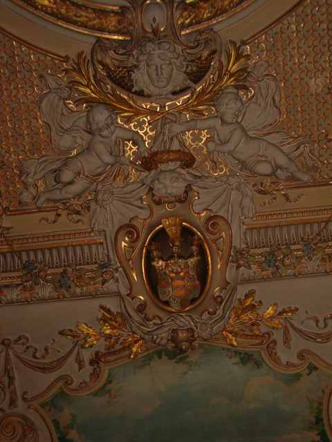 Sala Biała. Pałac w Krowiarkach.